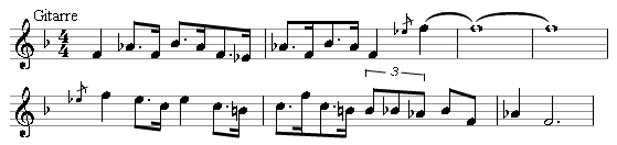 Blues Guitar from Deep Purples title "Lazy"